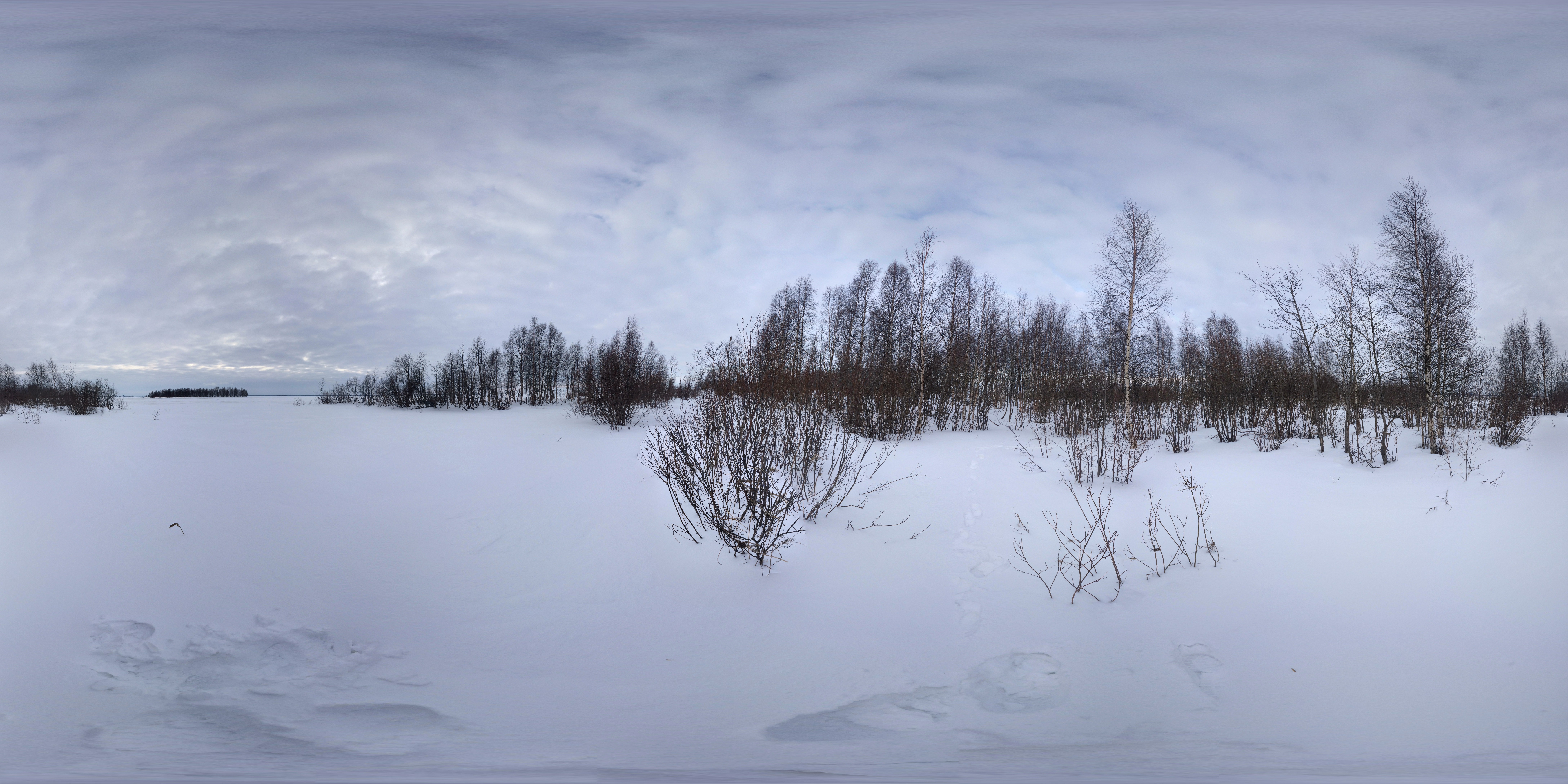 Hermannit panoraama